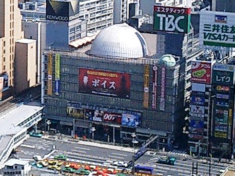 渋谷駅全景 2003年4月投稿者撮影